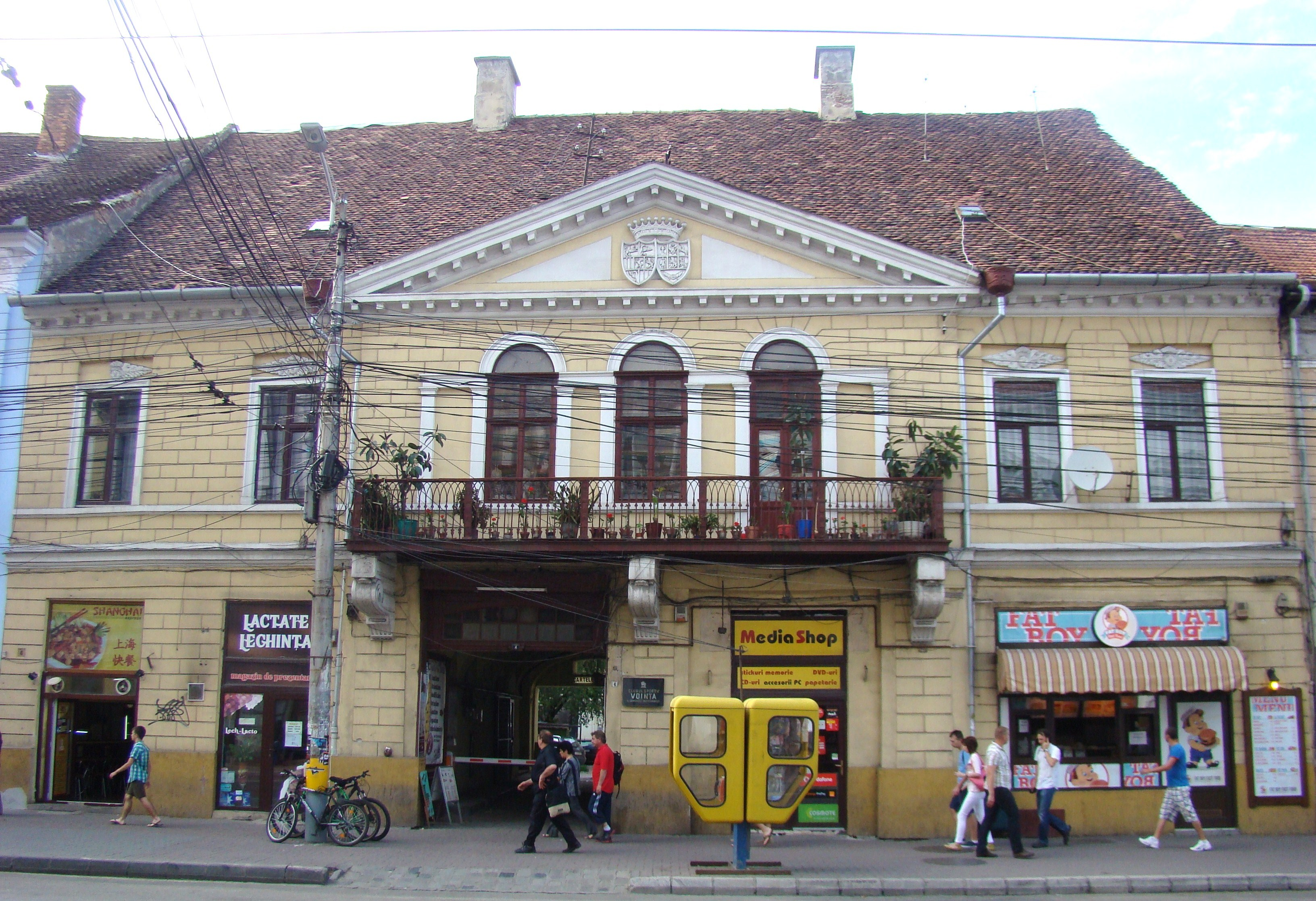 Casă monument istoric, str.Memorandumului, nr. 4: casa în care a locuit Frantz Liszt